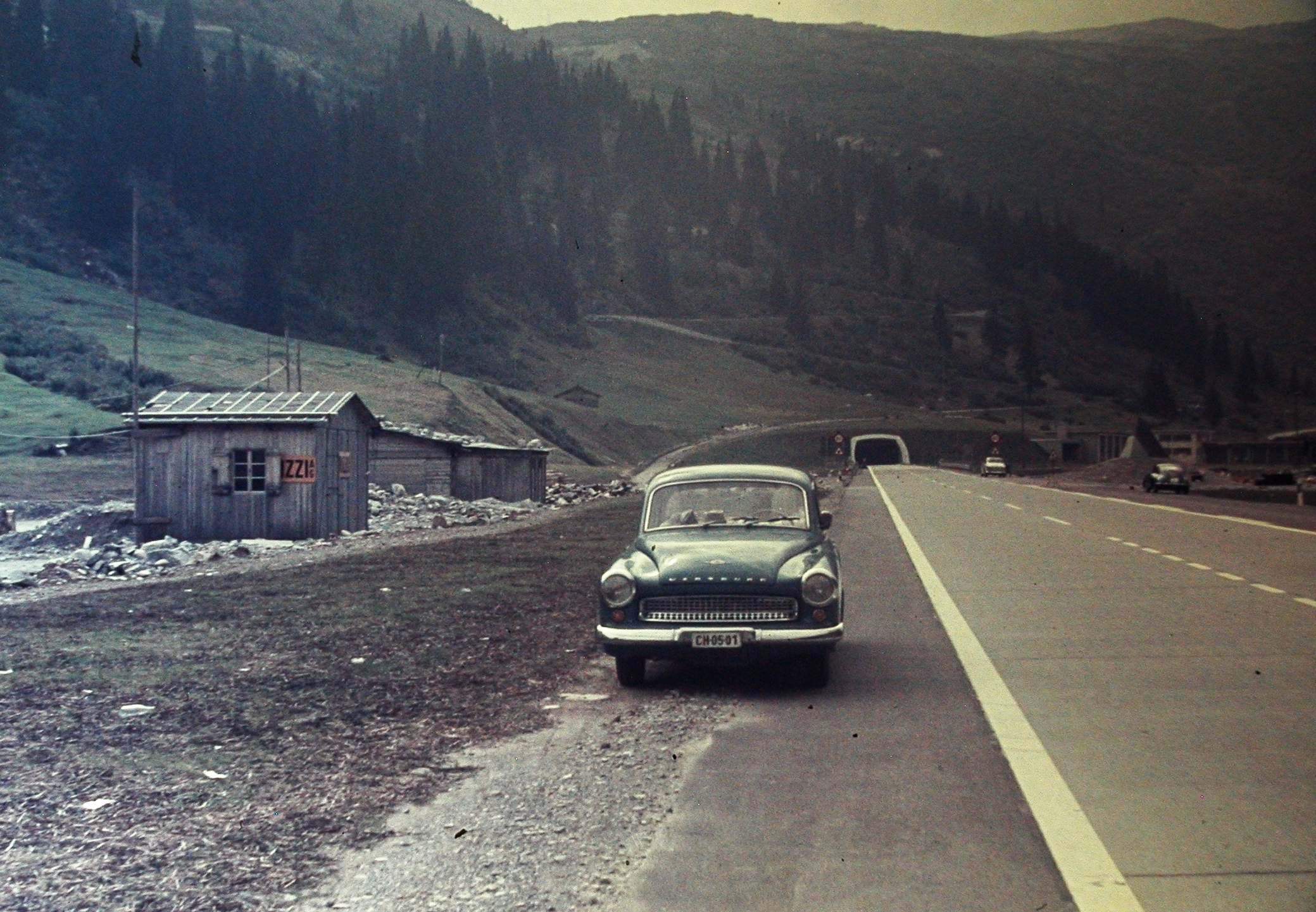 a Szent Bernát alagút déli bejárata. Location: Switzerland Tags: colorful, automobile, Wartburg-brand, Gerrman brand, tunnel, booth, hillside, spruce forest Title: a Szent Bernát alagút déli bejárata.